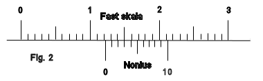 Nonius lille aflæsning.